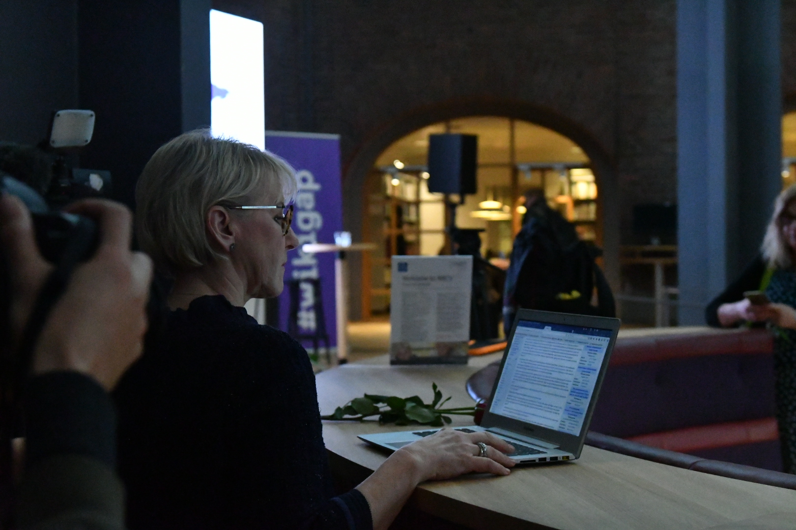 Skrivstugan WikiGap på internationella kvinnodagen 2018-03-08. Skrivstugan är ett samarbete mellan Wikimedia Sverige och Utrikesdepartementet och anordnades på KTHs bibliotek.